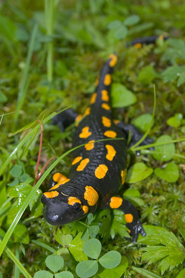 Фауна заповіднику Горгани: Фауна заповіднику Горгани